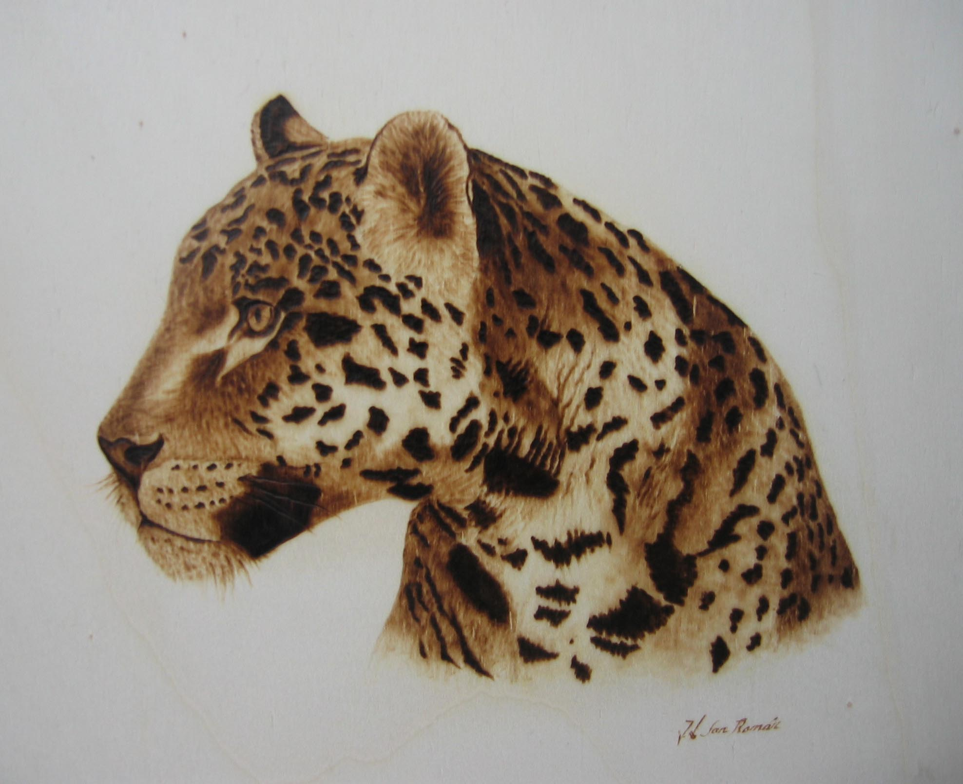 Leopardo